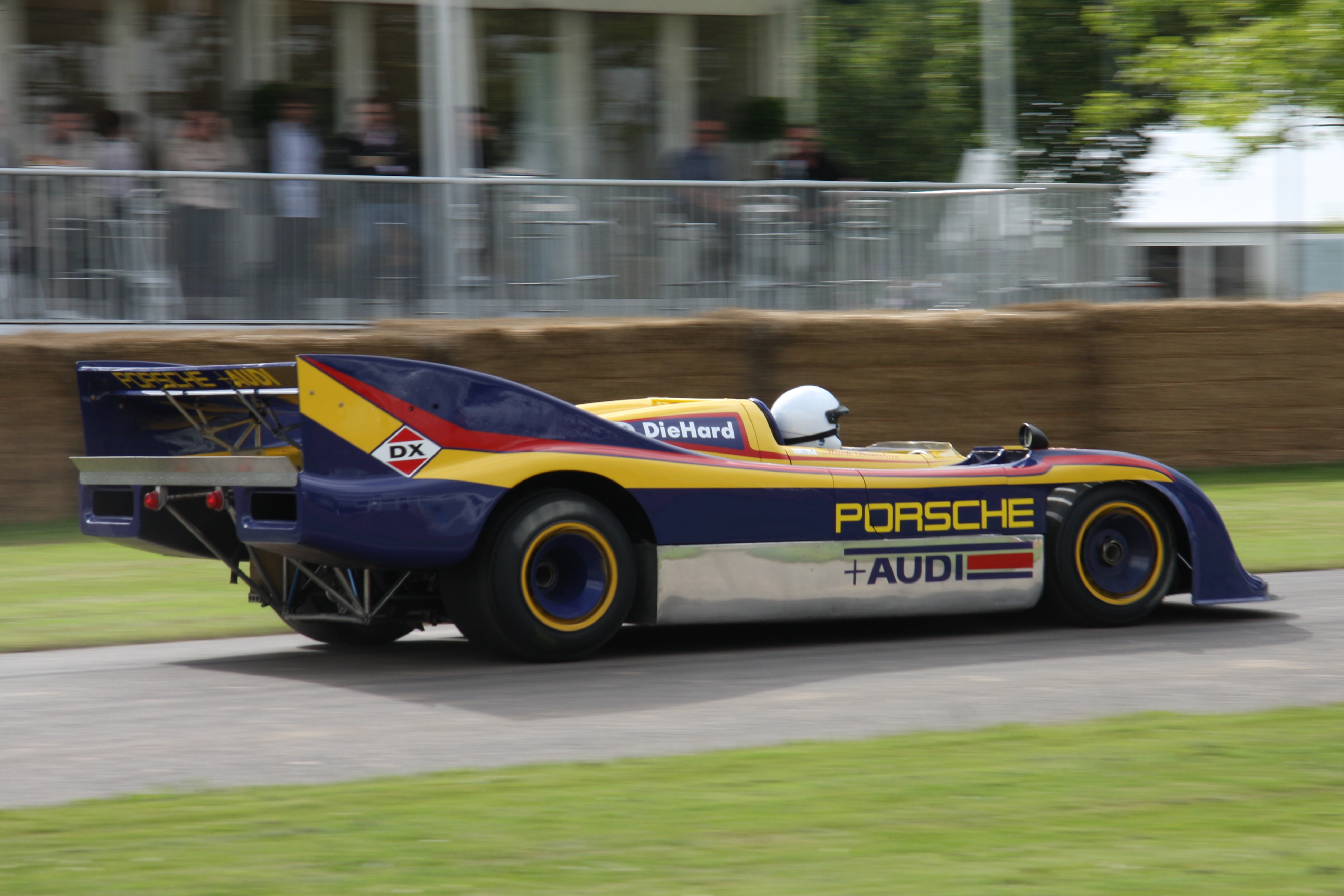 Built 1973. 5.4 litre flat 12